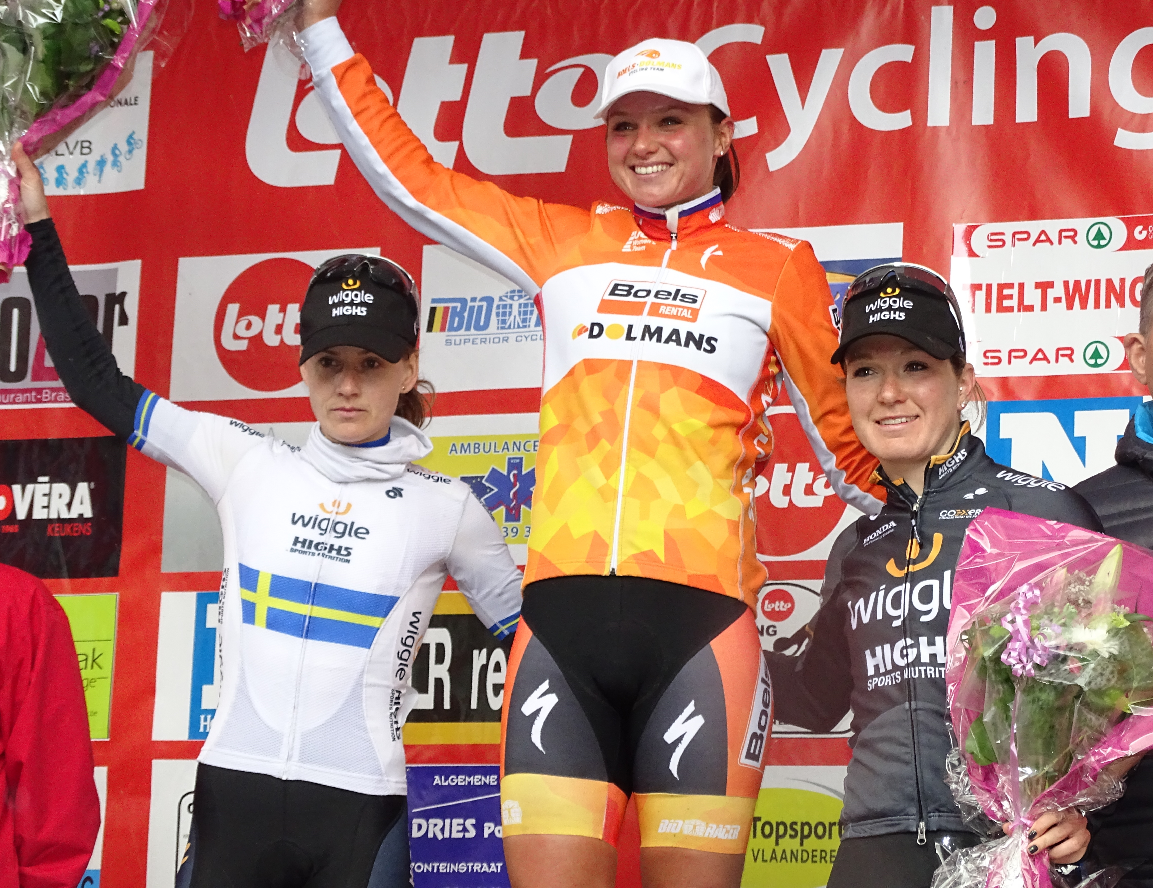 Reportage réalisé le mercredi 2 mars à l'occasion de l'arrivée du Samyn des Dames 2016 et du Samyn 2016 à Dour, Belgique.